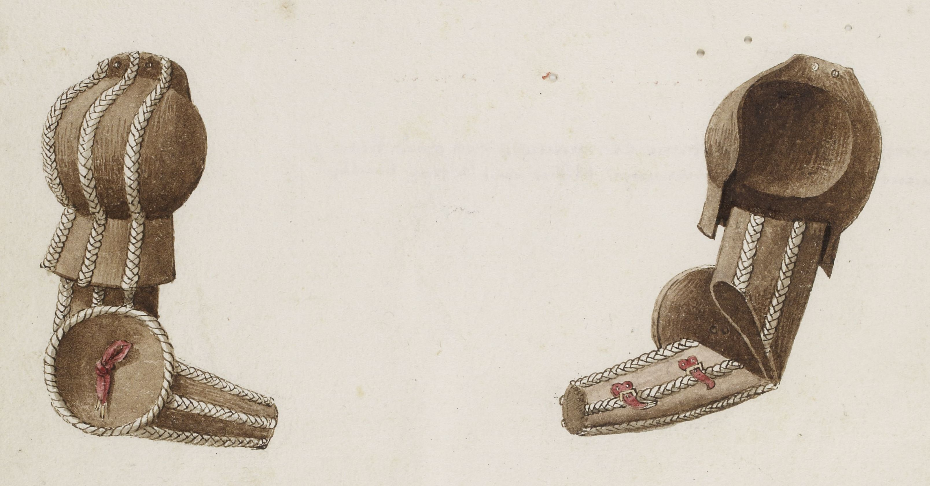 Bras d'arme en acier et en cuir bouilli. Enluminure du Livre des tournois du Roi René d'Anjou, dessins de Barthélemy d'Eyck